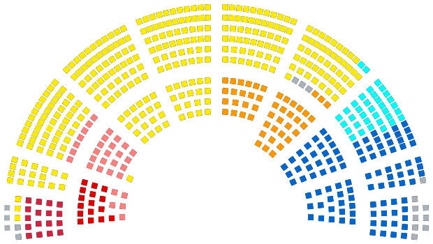 Depuis le 1er juillet 2017 : REM (314) LR (100) MoDem (47) LC (35) NG (31) FI (17) GDR (16) Non inscrits (17)